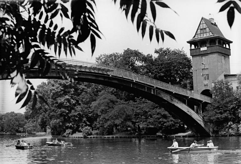 ADN-ZB Zimmermann 1.8.79-#-Berlin: Eine Kahnpartie auf der Spree - hier an der Brücke zur Insel der Jugend in Treptow.